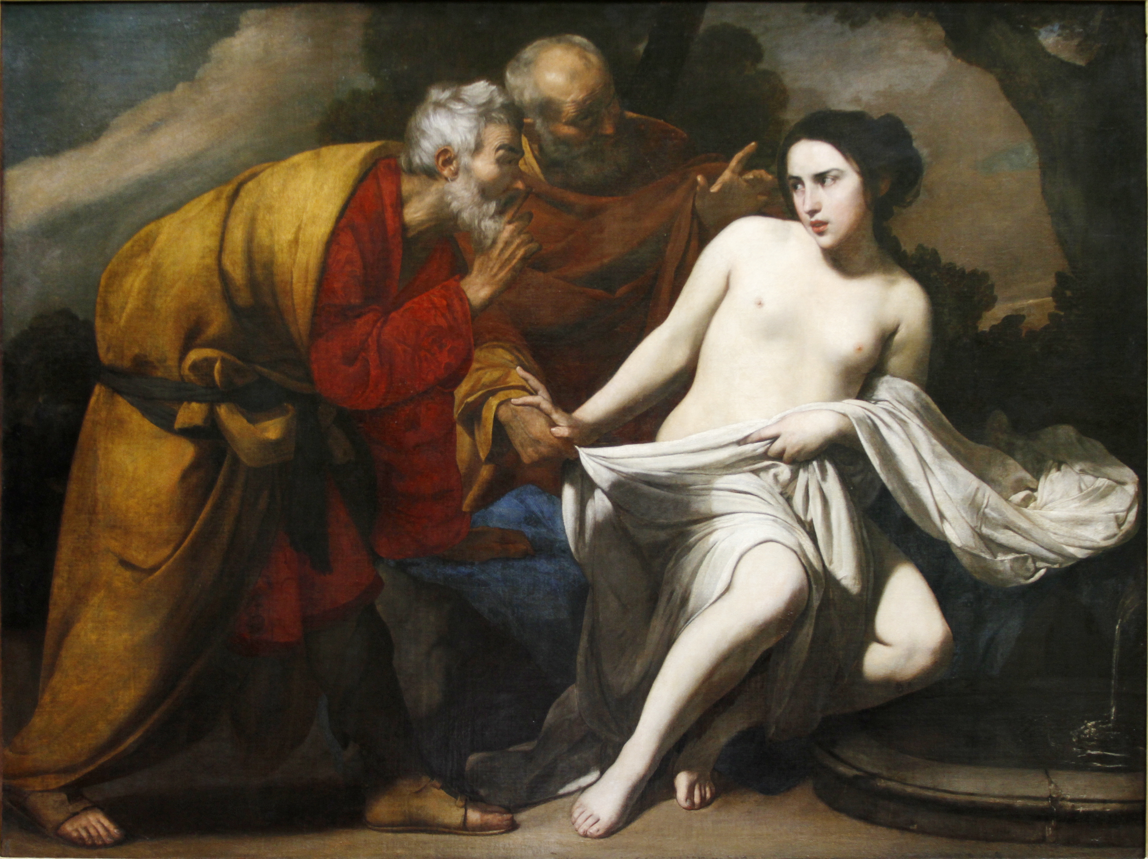 Städel - Frankfurt am Main - Germany